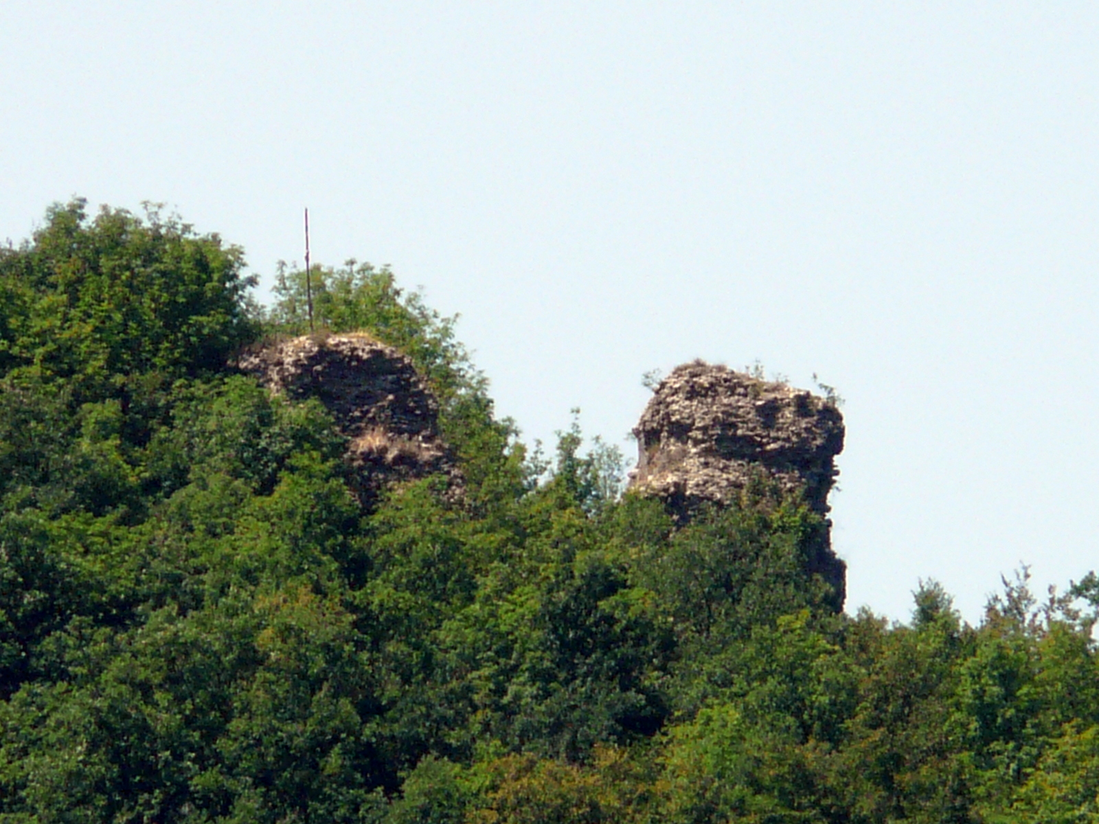 Ruderi del castello dei Fieschi, Montoggio, Liguria, Italia